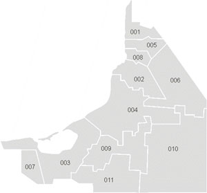 Mapa de los municipios del estado mexicano de Campeche